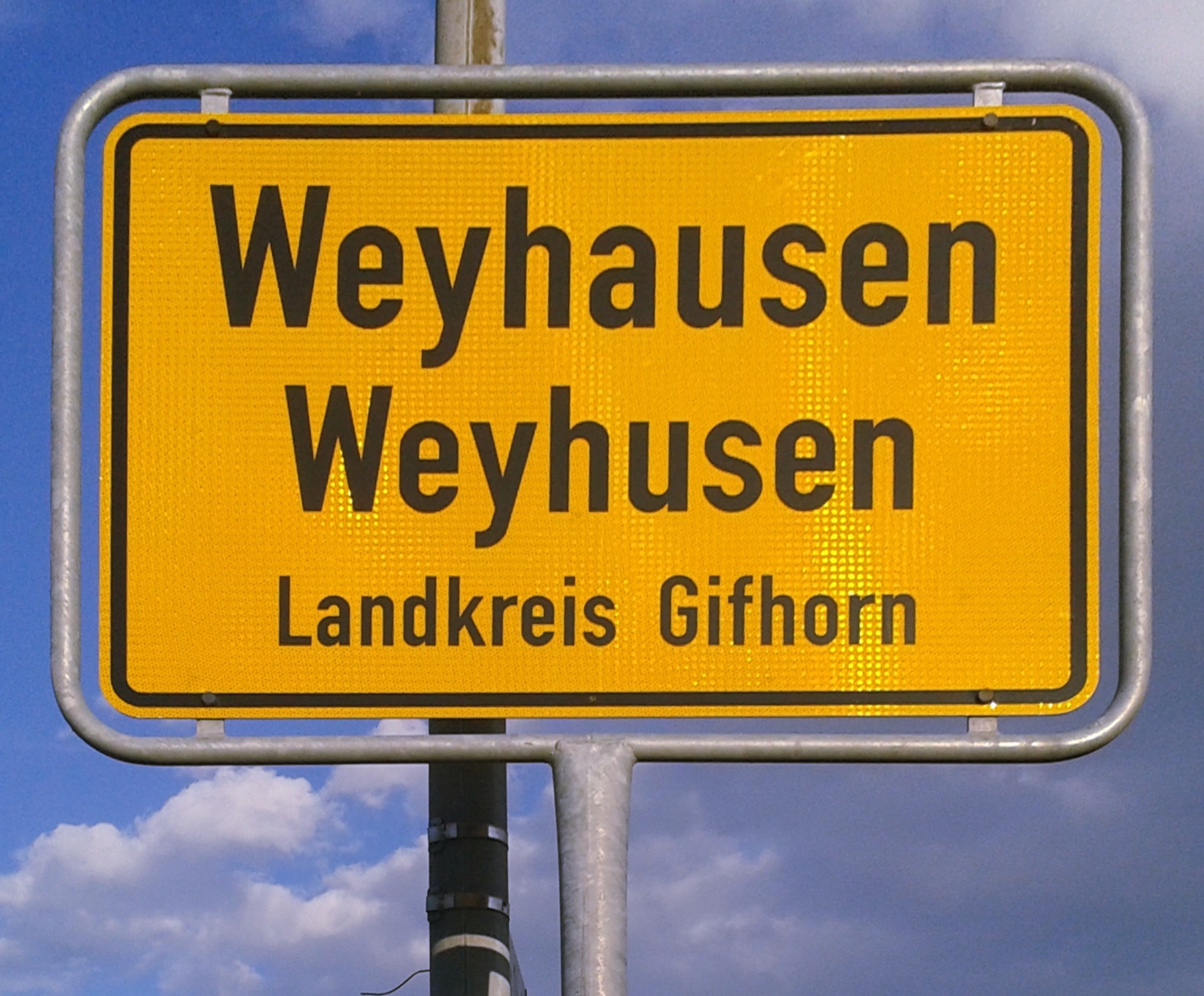 Zweisprachiges Ortsschild in Weyhausen / Weyhusen (Niedersachsen).